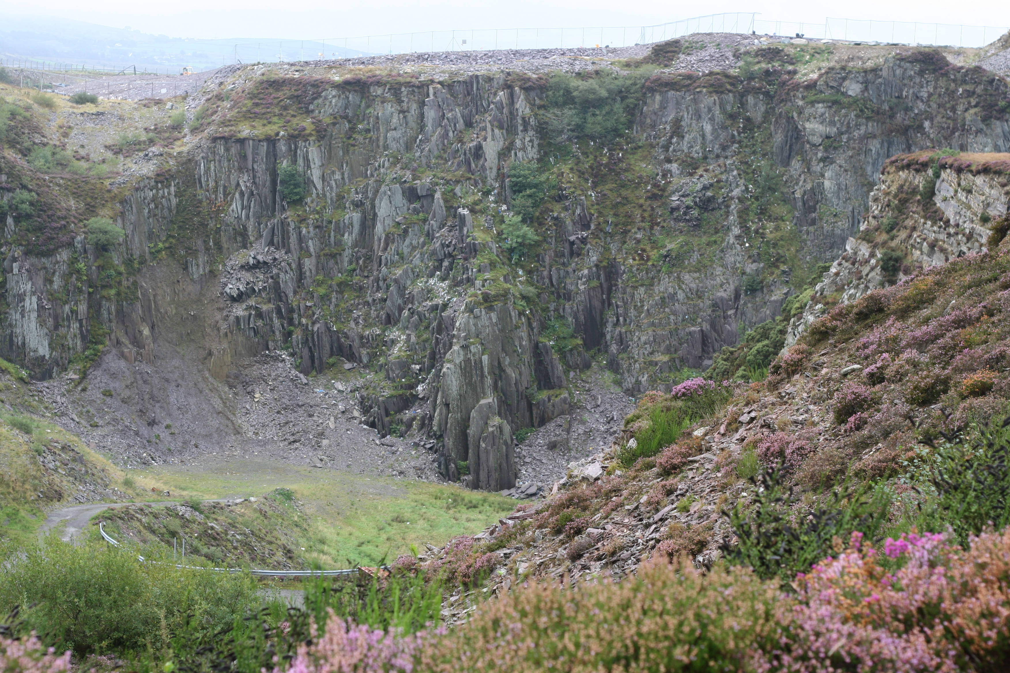 Cilgwyn Quarry, Gwynedd Rhion Pritchard - own work 05/09/2006